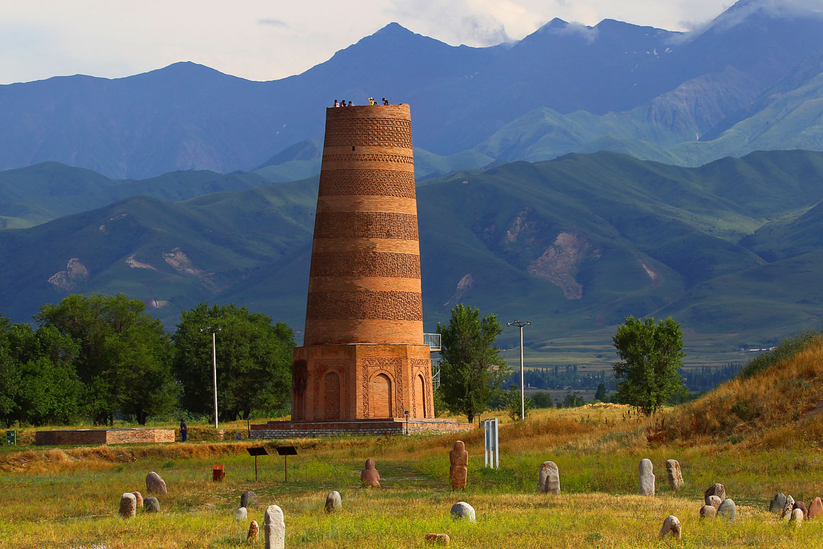 Киргизия. Башня Бурана. Бурановское городище